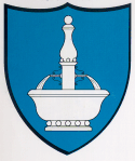 Wappen von Fontaines, Kanton Neuenburg Schweiz